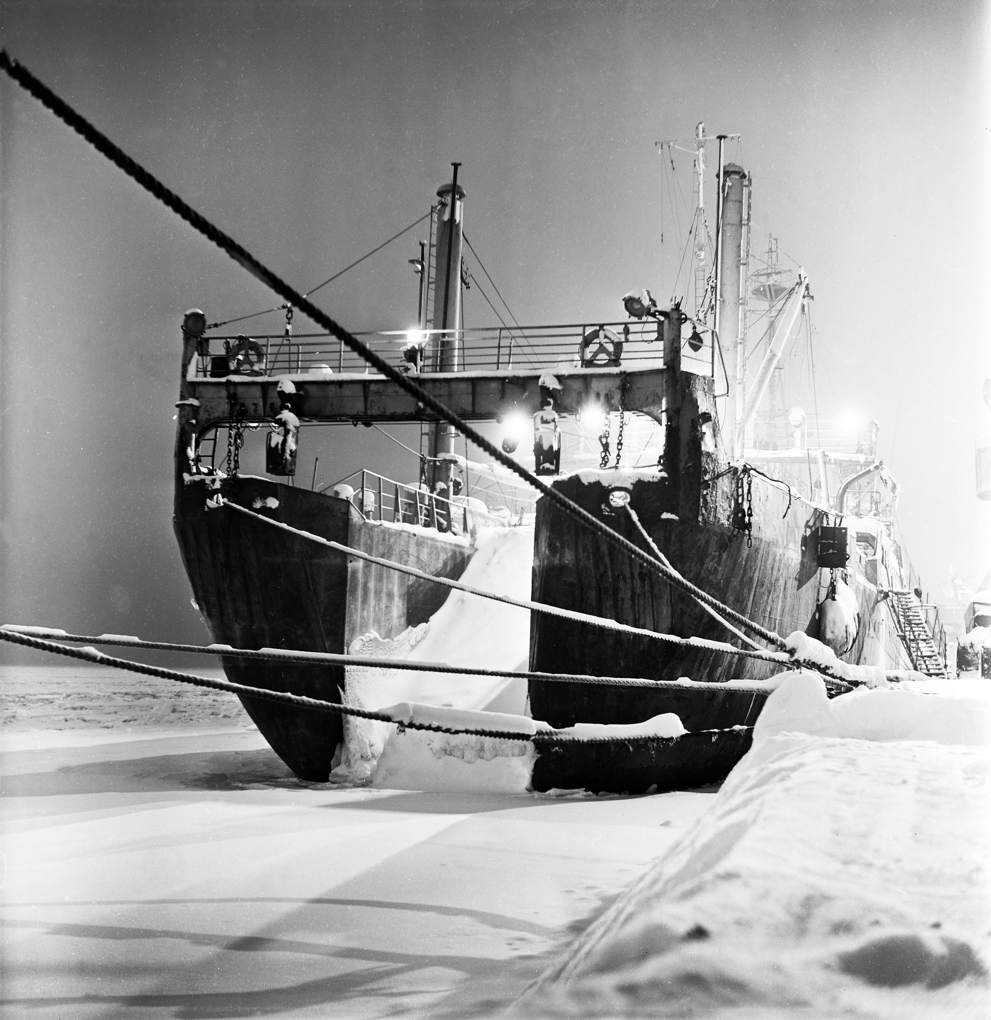 BMRT (БМРТ) – suur külmutustraaler (большой морозильный рыболовный траулер). Paljassaare sadam 79